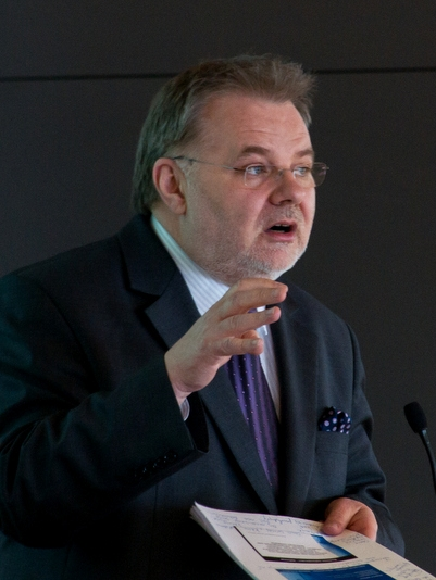 Konferencja seksuologiczna Kraków 2012